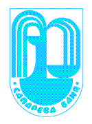 Герб на Сапарева баня.